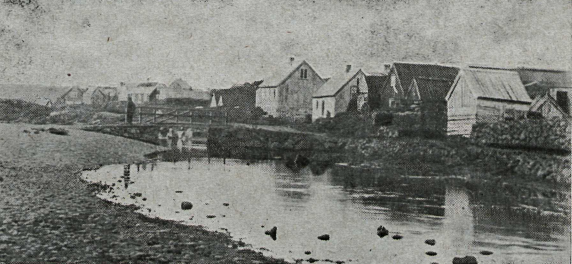 Hamarskotslækur í Hafnarfirði og nokkur hús, brú og konur að þvo þvott. Mynd frá um 1890.